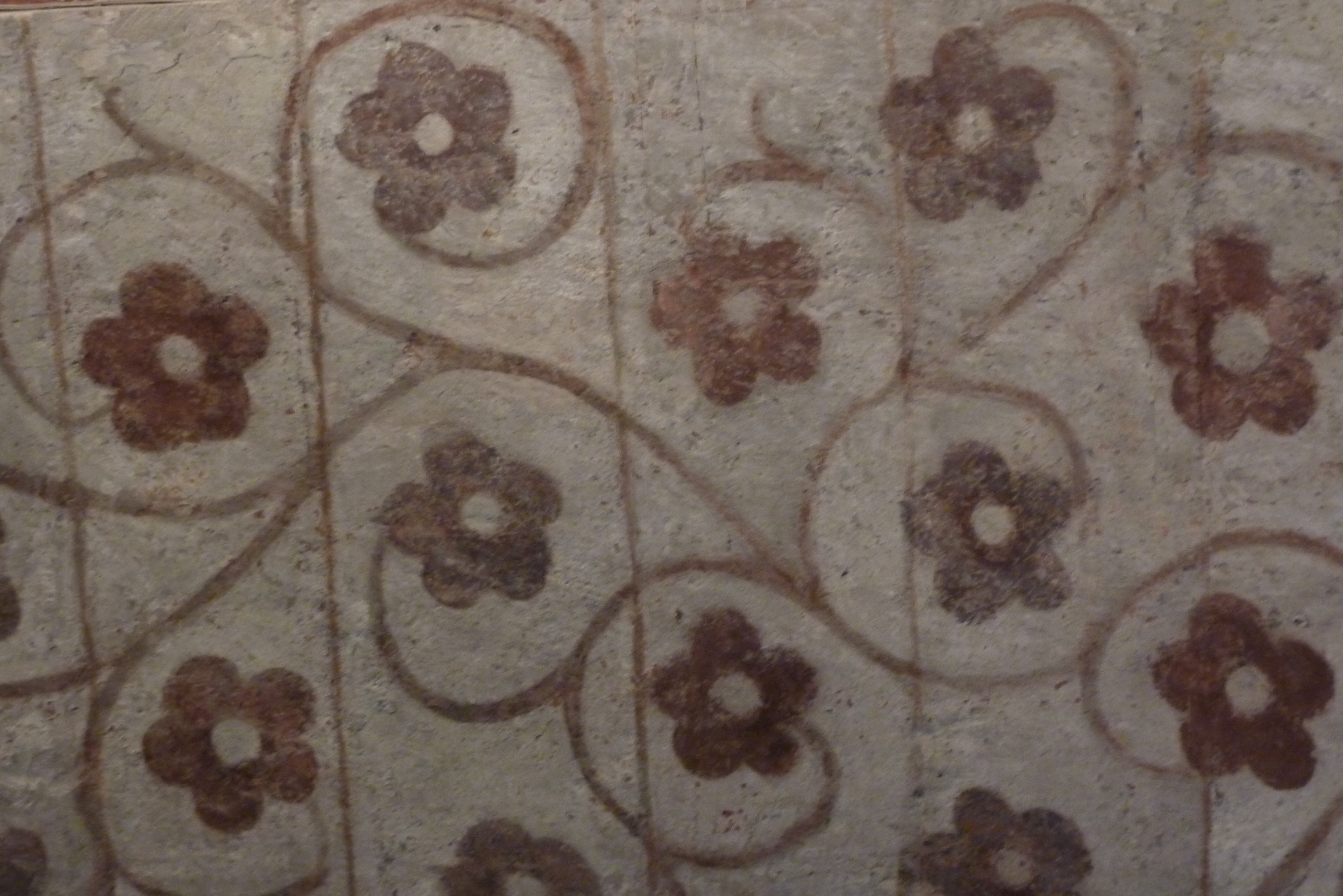 Katholische Pfarrkirche St. Cyriakus in Niedermendig, Wandmalerei, Blütenranken